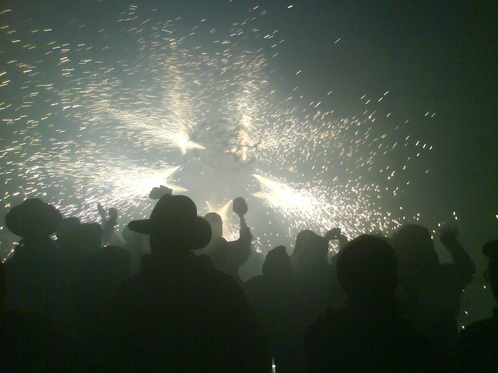 Paolo Rocchetti